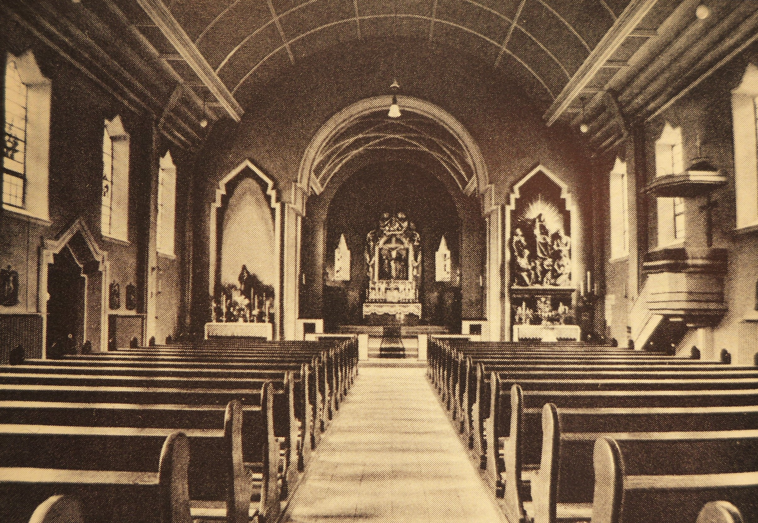 St. Antonius von Padua (Rastpfuhl), Innenraum in der Gestaltung des Jahres 1938 (Pfarrarchiv)